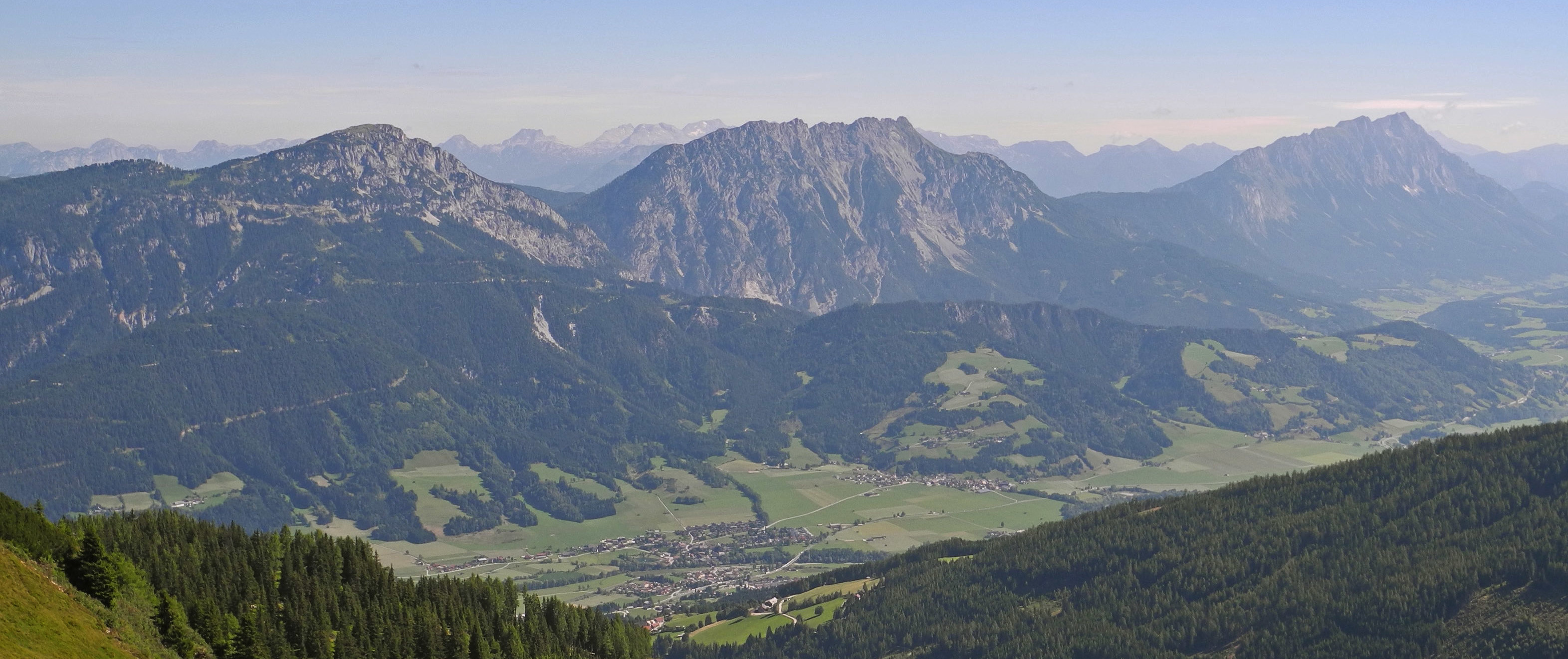 Blick vom Hauser Kaibling über das Gumpental und Aich im Ennstal zum Stoderzinken (2048 m), Kammspitz (2139 m) und Grimming (2351 m)